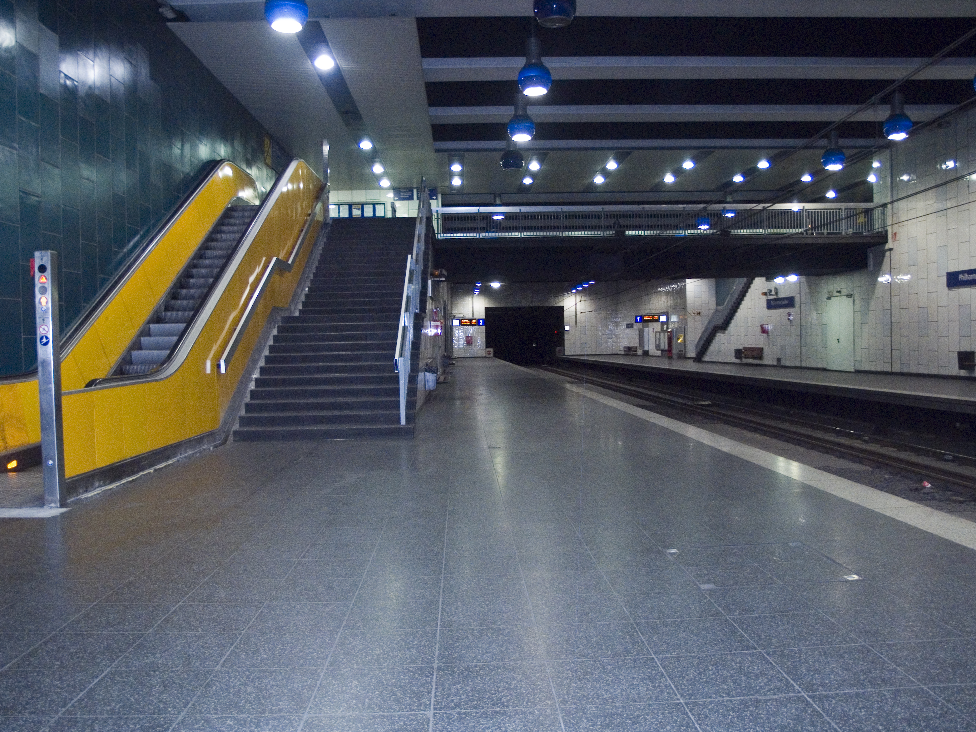 Северный Рейн - Вестфалия, Эссен - станция метро 'Philharmonie-Saalbau'